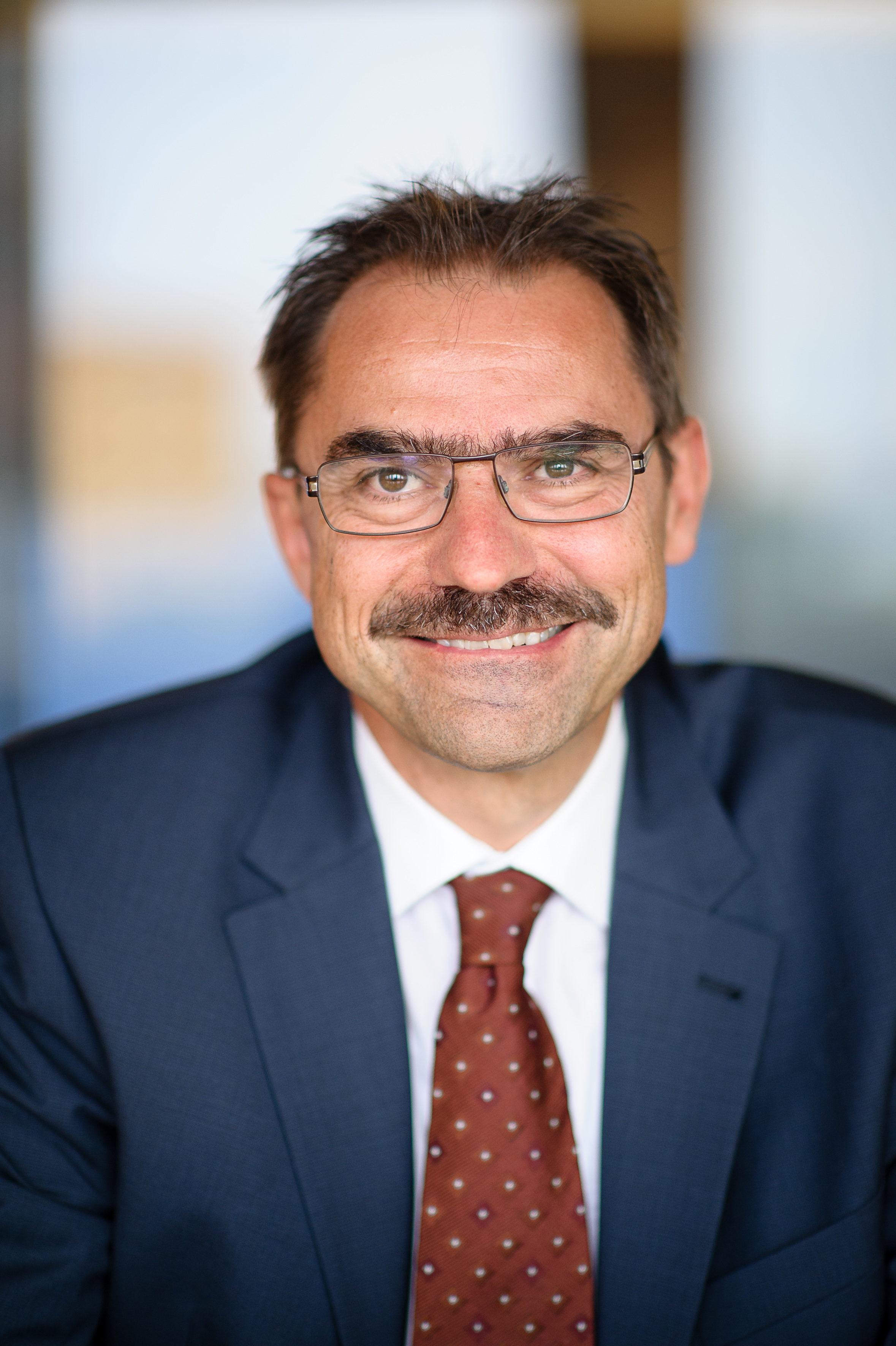 Hans Rupli